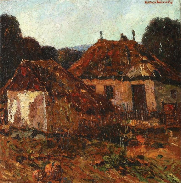 Case taranesti - Curtea cu dovleci